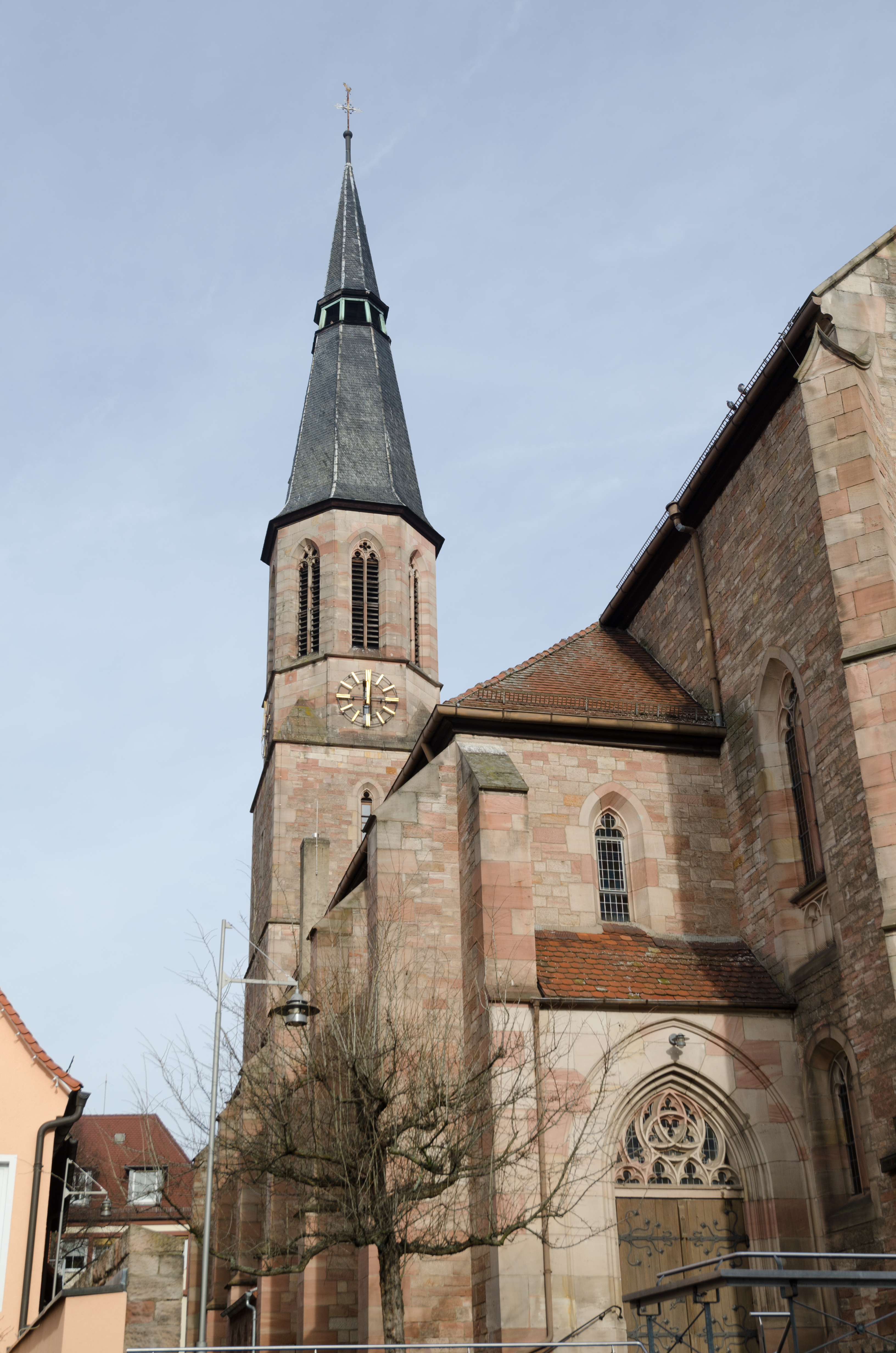 Hösbach, Hauptstraße 93, Pfarrkirche St. Michael